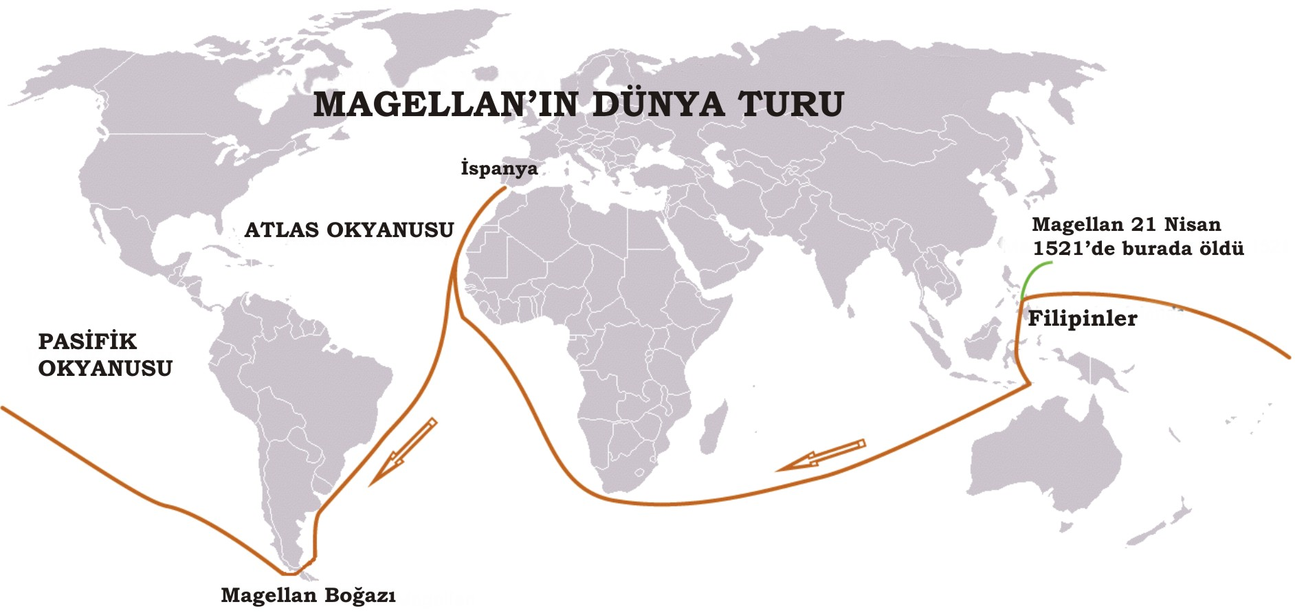 magellan'ın turu Commons'da bulunan Resim:Magellan-Map-En.png'nin Türkçesi.